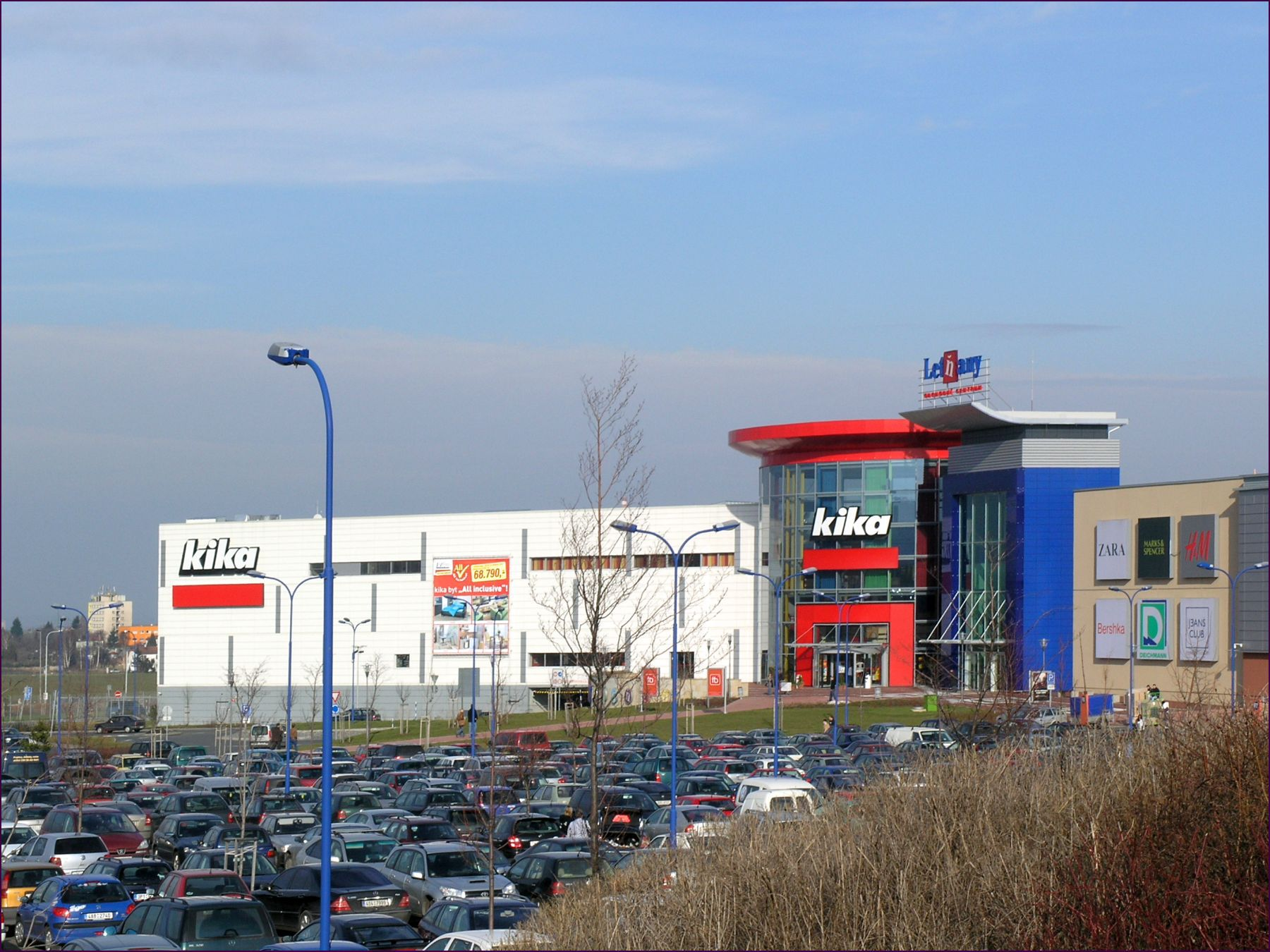 Praha, Letňany - obchodní centrum Tesco, Kika